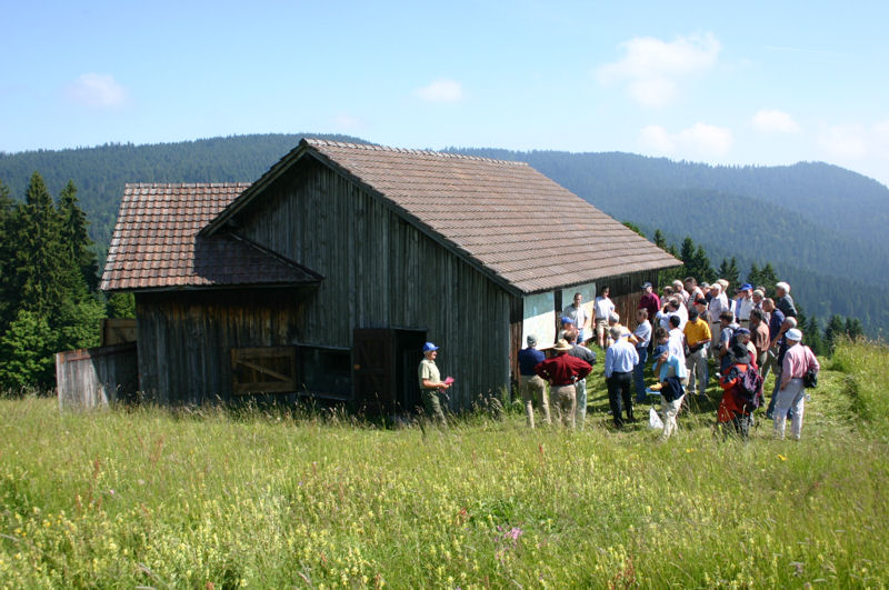 Besichtigung Bunker Raten 1 A 7195